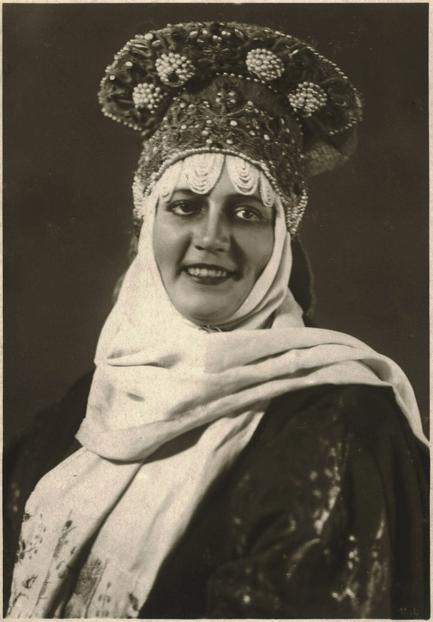 Ф. В. Шевченко. «Царь Фёдор Иоаннович»